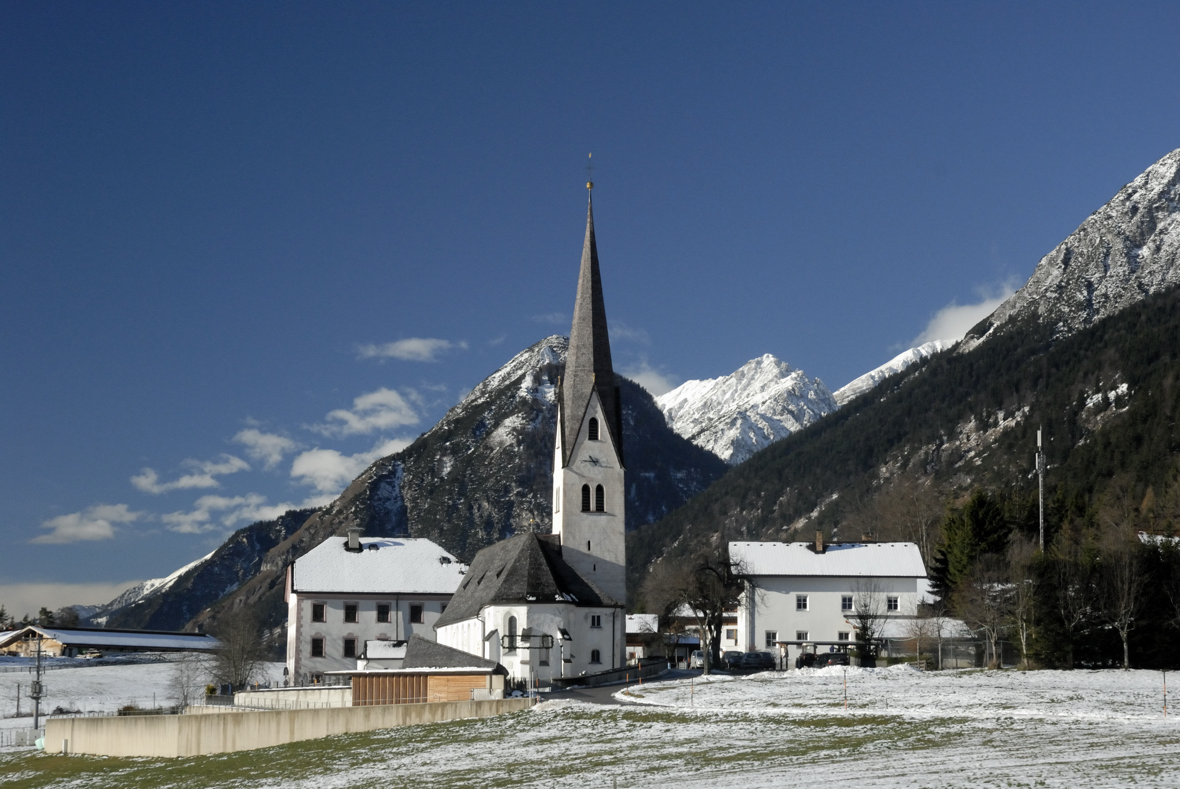 Gnadenwald in Tirol, Ortsteil Sankt Michael